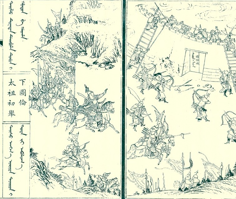 选自《满洲实录》